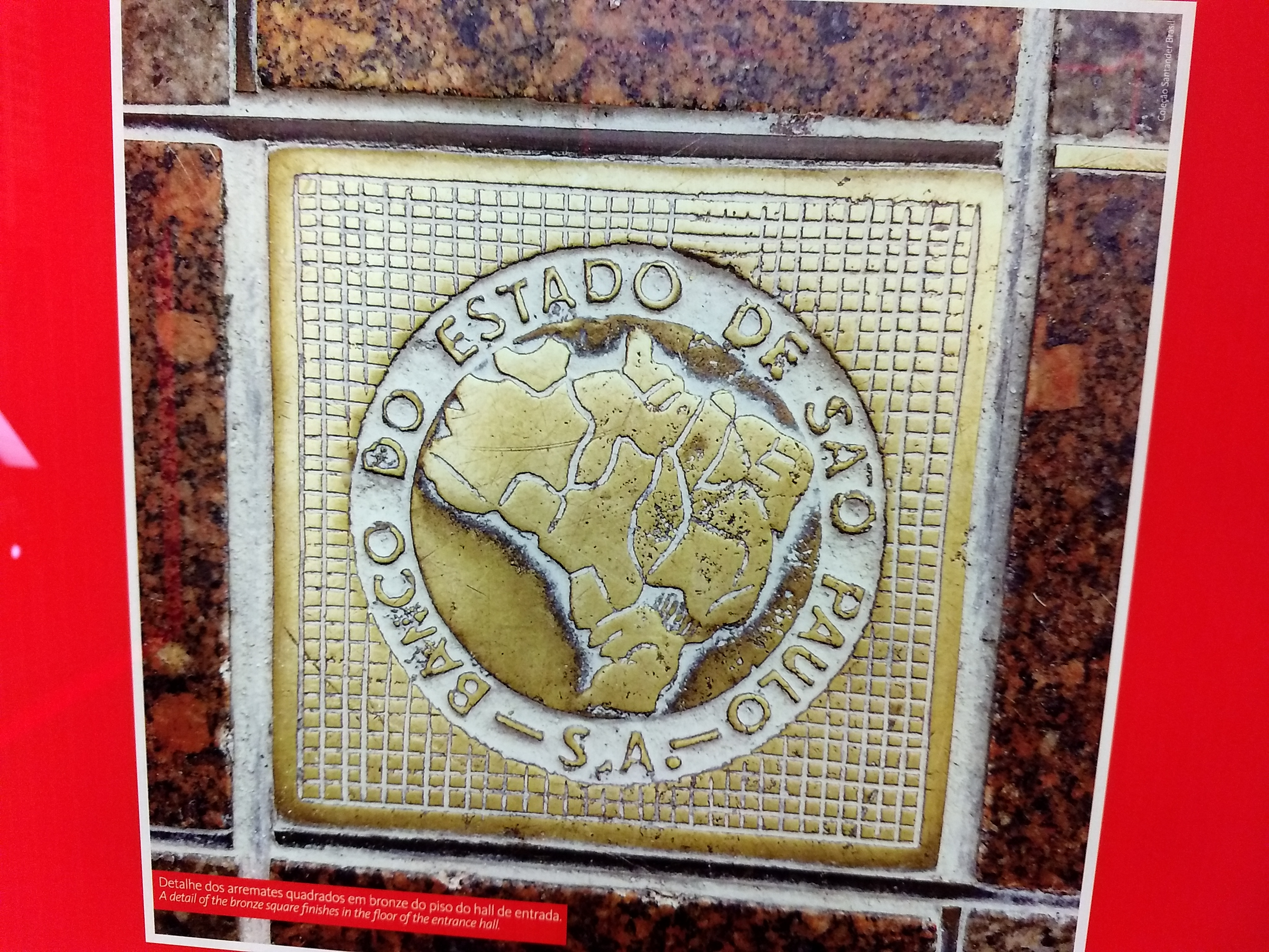 Foto interna Farol Santander em março de 2018, antigo prédio do Banco do Estado de São Paulo. Cultural property Edifício Altino Arantes, São Paulo (city), São Paulo (state), Brazil Q169420, P727: CONDEPHAAT ID: edificio-altino-arantes